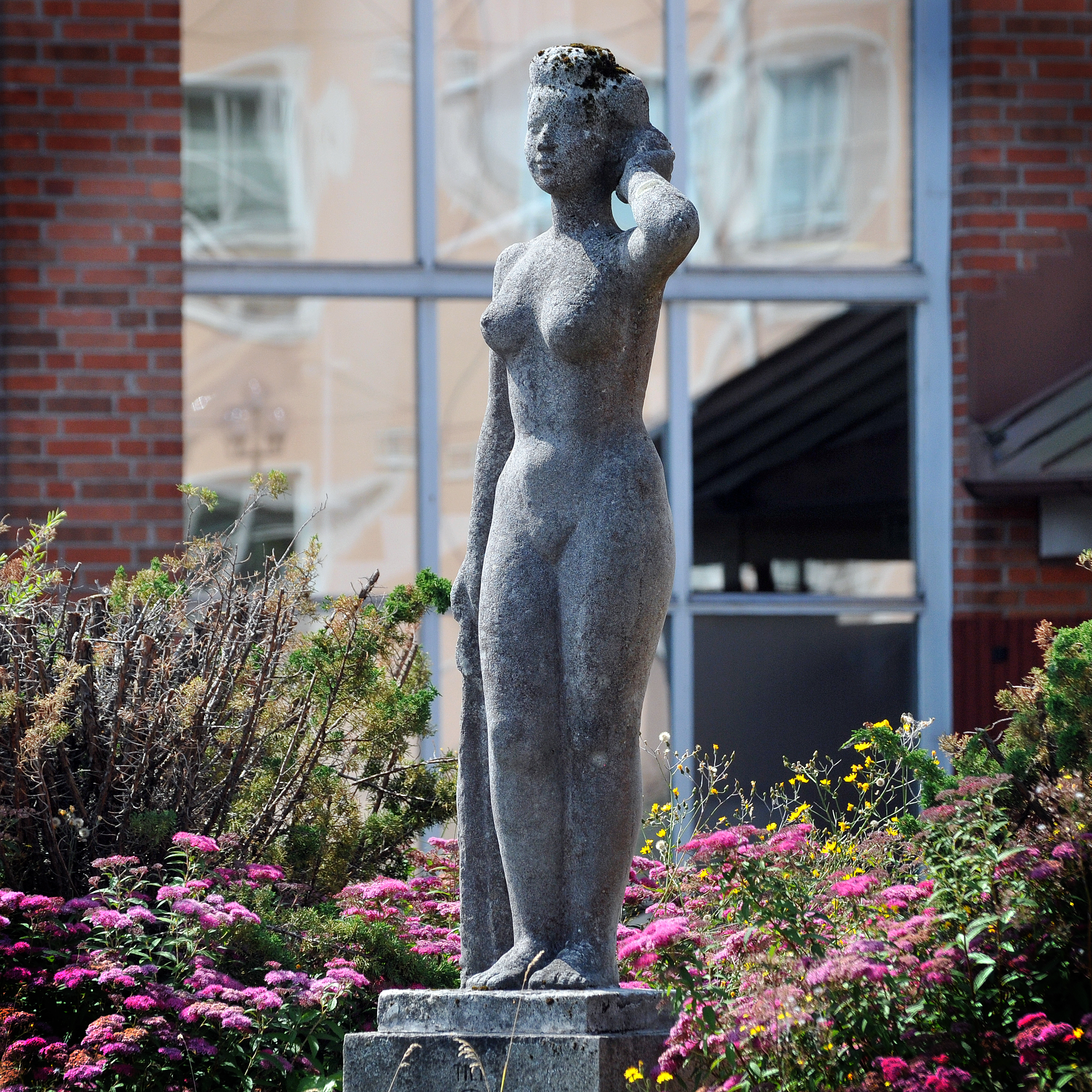 Eva, vid hotel Kompaniet, Nyköping.